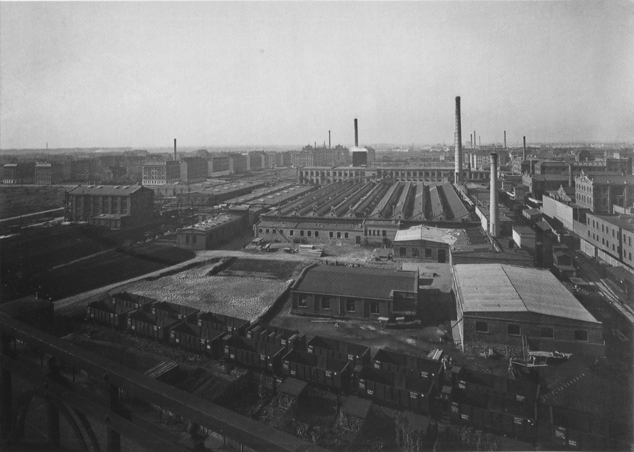 Blick auf Leipzig-Plagwitz. Der Bildausschnitt wird oben von der Gießerstraße, rechts von der Markranstädter Straße und unten von der Zschocherschen Straße begrenzt. Der Hallenkomplex in der Mitte des Bildes gehört der Kammgarnspinnerei Stöhr & Co. Heute befindet sich dort ein Baumarkt (Toom?).